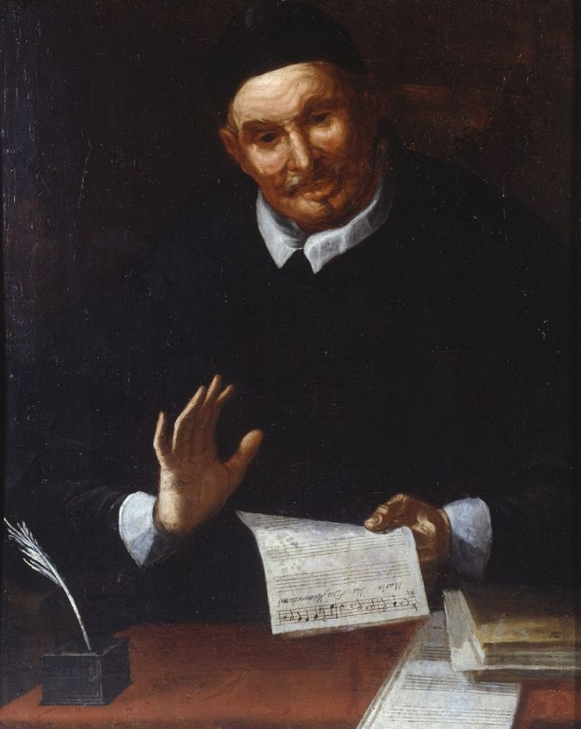 Retrato atribuido a Pedro Félix Patiño (1623-1664), hijo de Carlos Patiño. El compositor sostiene en su mano un fragmento de una de sus obras más famosas: el Maria mater Dei. Biblioteca Nacional de España.